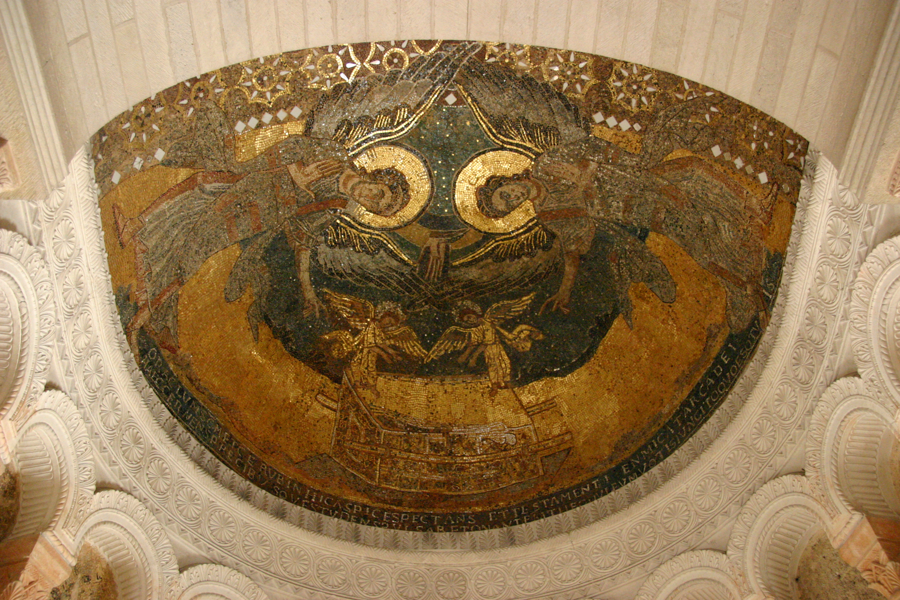 Kirche von Germigny-des-Prés im Loiret (Region Centre-Val de Loire). Apsismosaik aus der Zeit um 800.